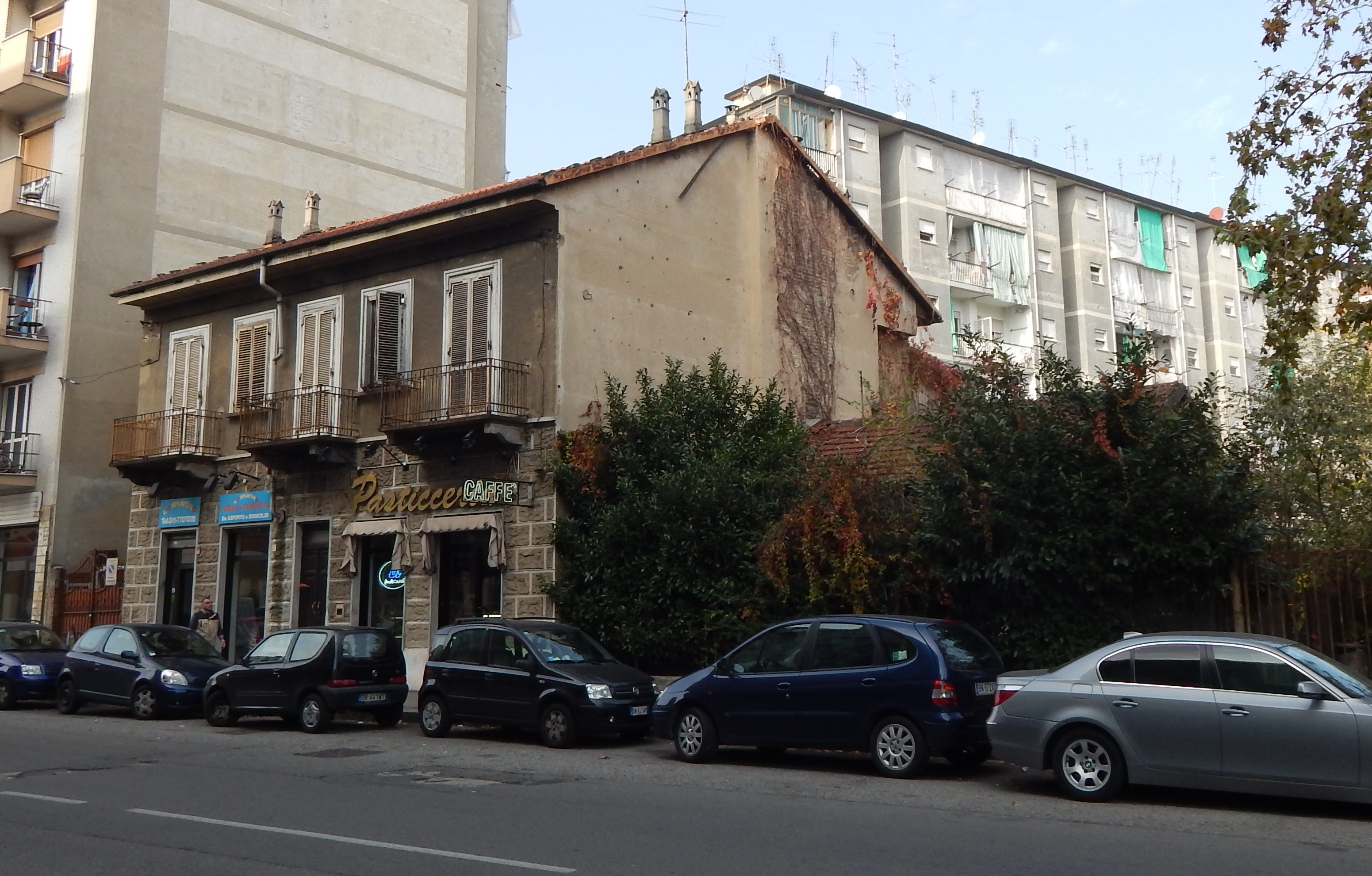 Una veduta di Borgata Lesna